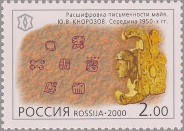 марка